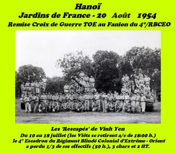 4. RBCEO nach der Schlacht bei Vinh-Yen (10-18/07/1954)